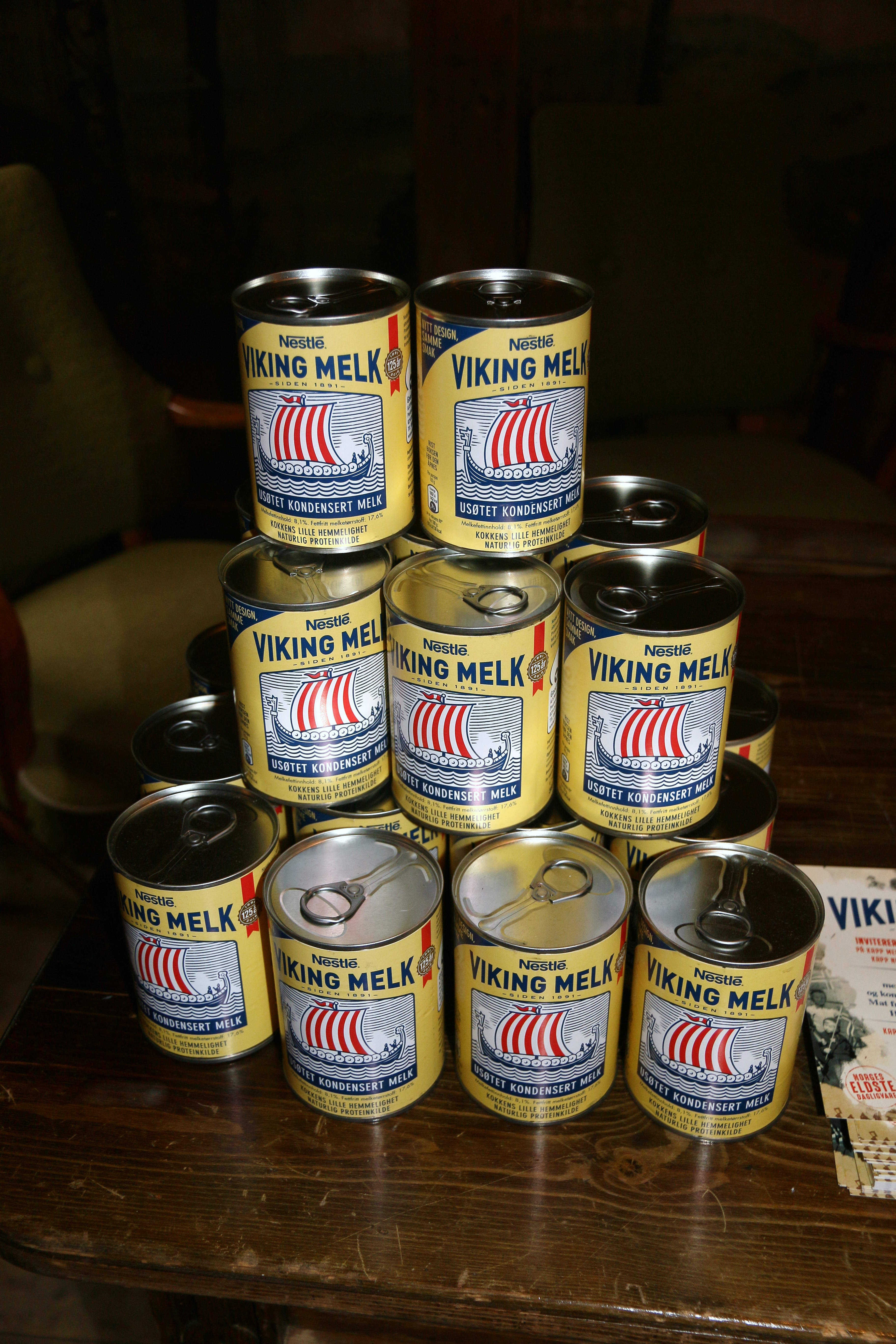 Vikingmelk eller kondensert melk.